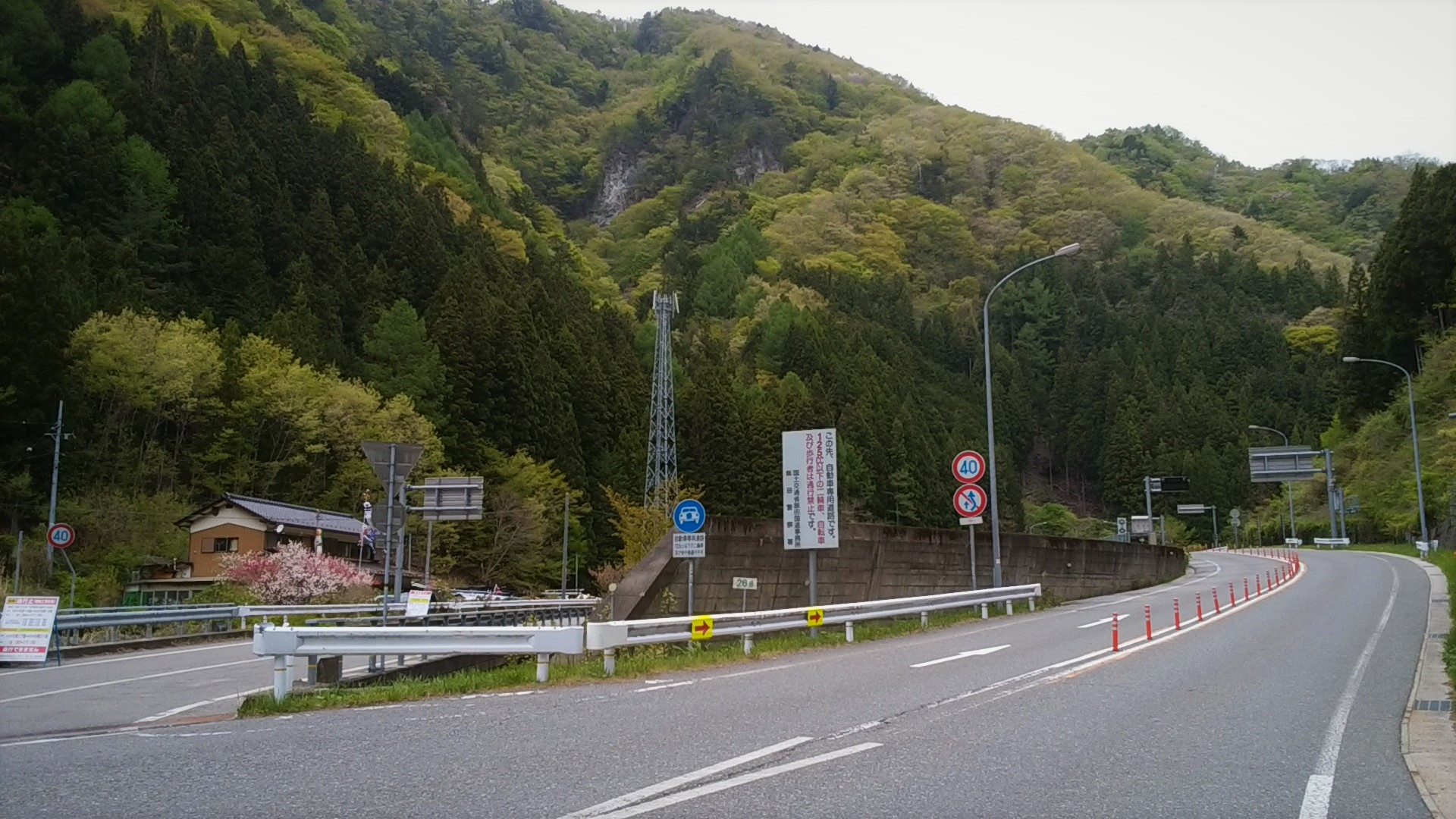 三遠南信道程野ICの1.2km手前地点の仮出入口